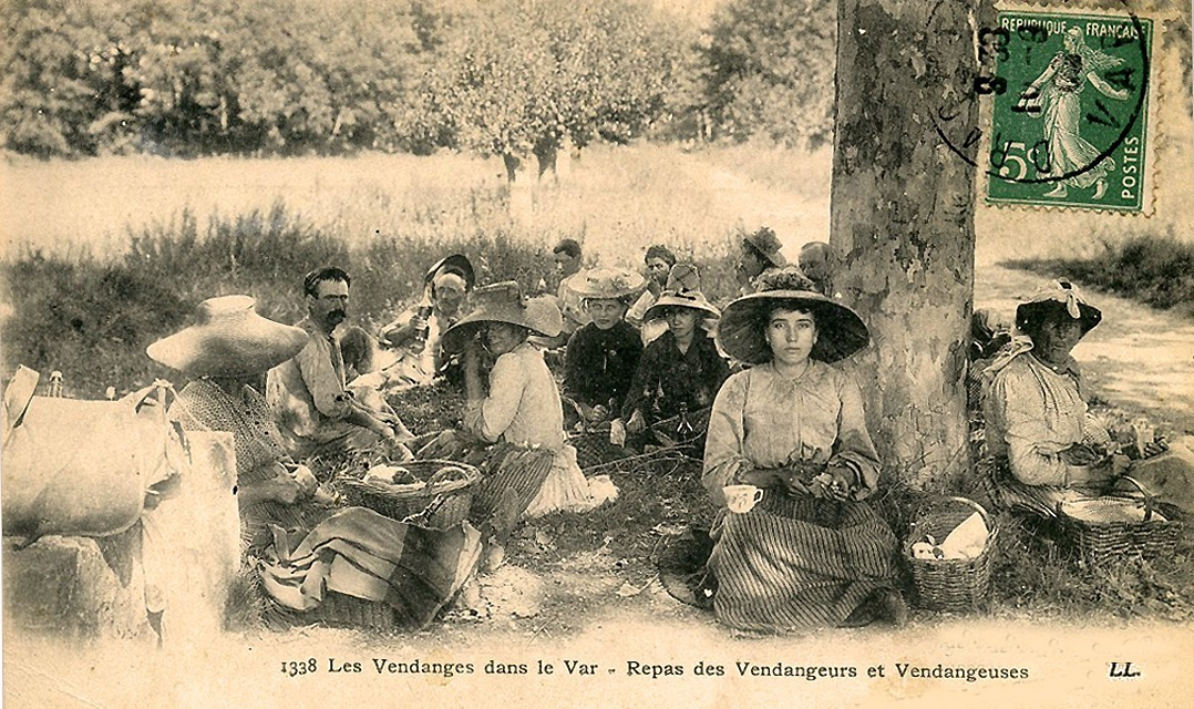 Repas de vendanges dans le Var Draguignan